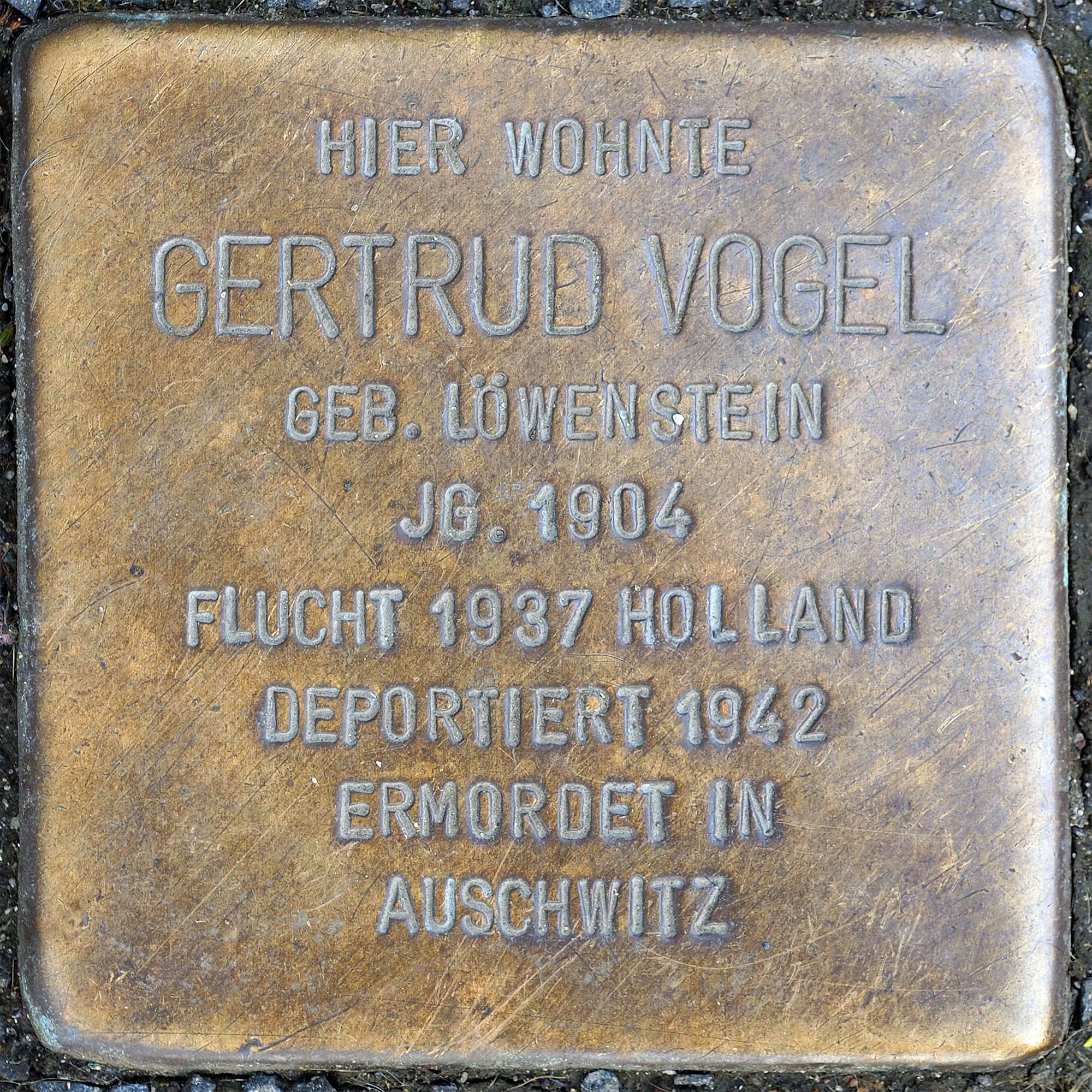 Stolpersteine MG: Vogel, Gertrud